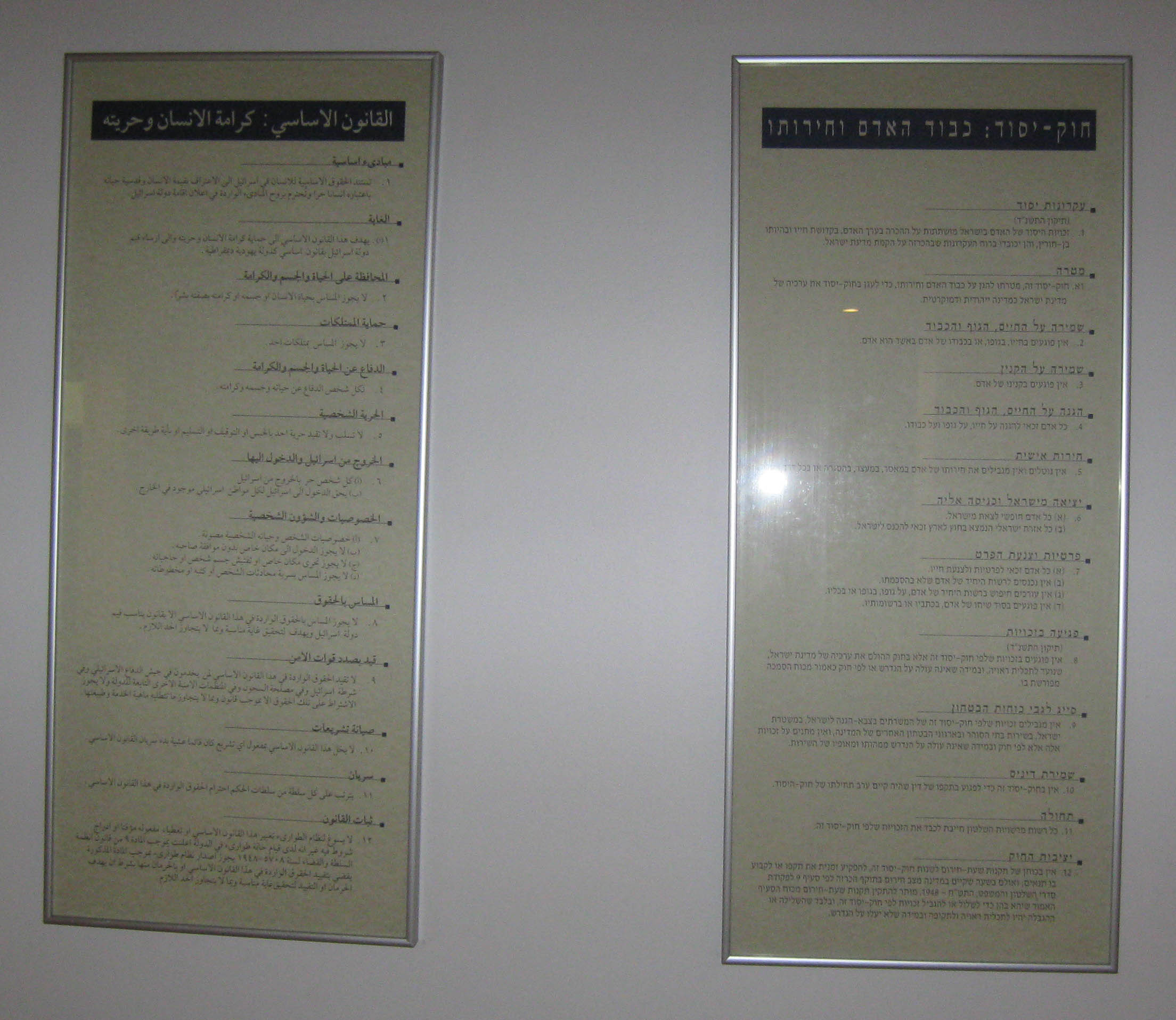 חוק יסוד כבוד האדם וחירותו על קיר ביהמ"ש העליון. בעברית ובערבית